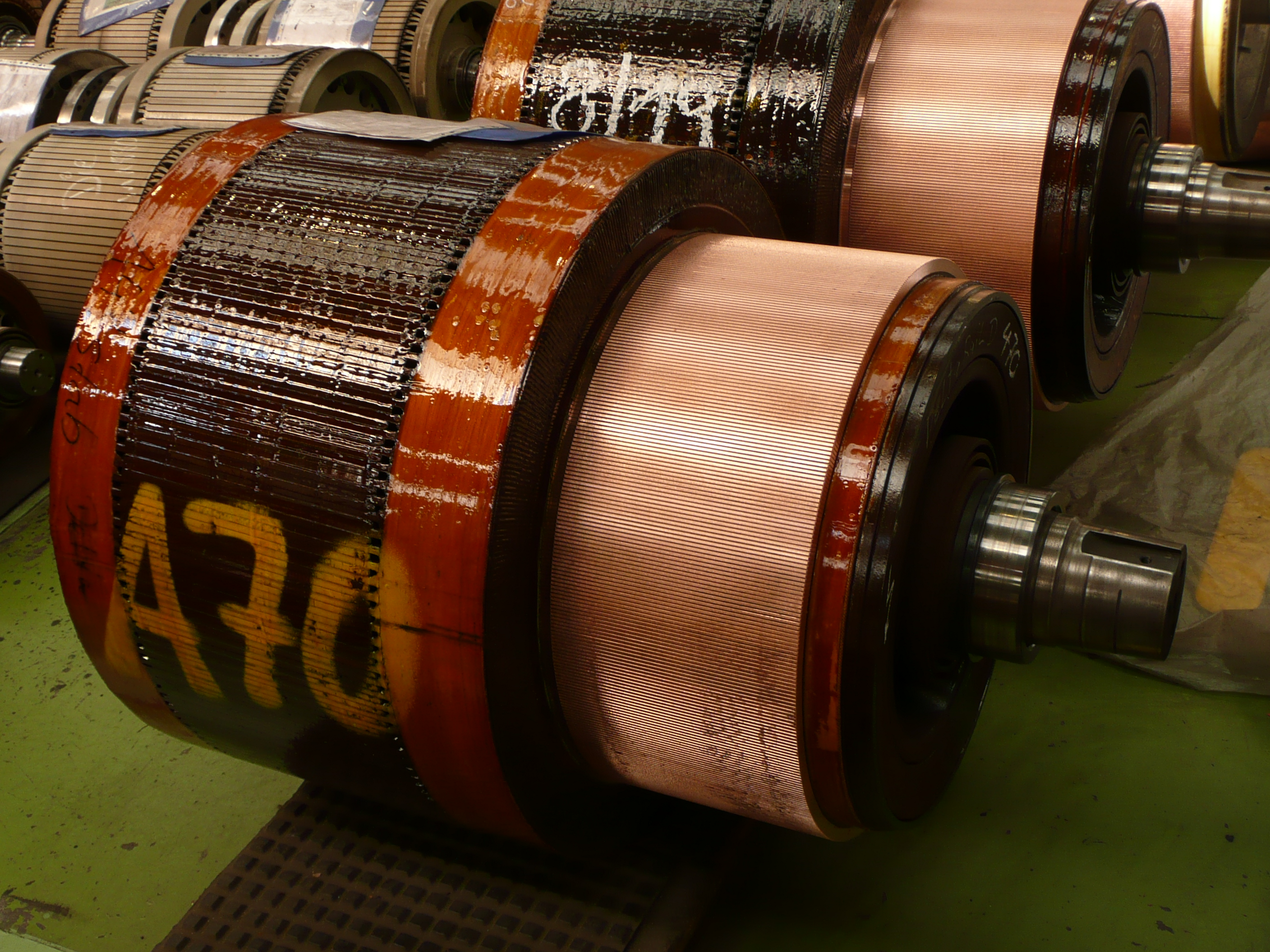 Rotor einer BR 140 in der Fahrmotorenwerkstatt des AW Dessau